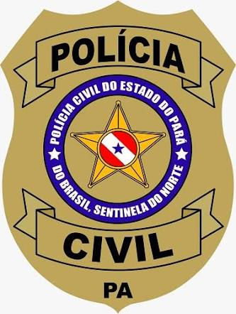 Novo brasão da polícia civil do Pará em conformidade a padronização das PCs do Brasil